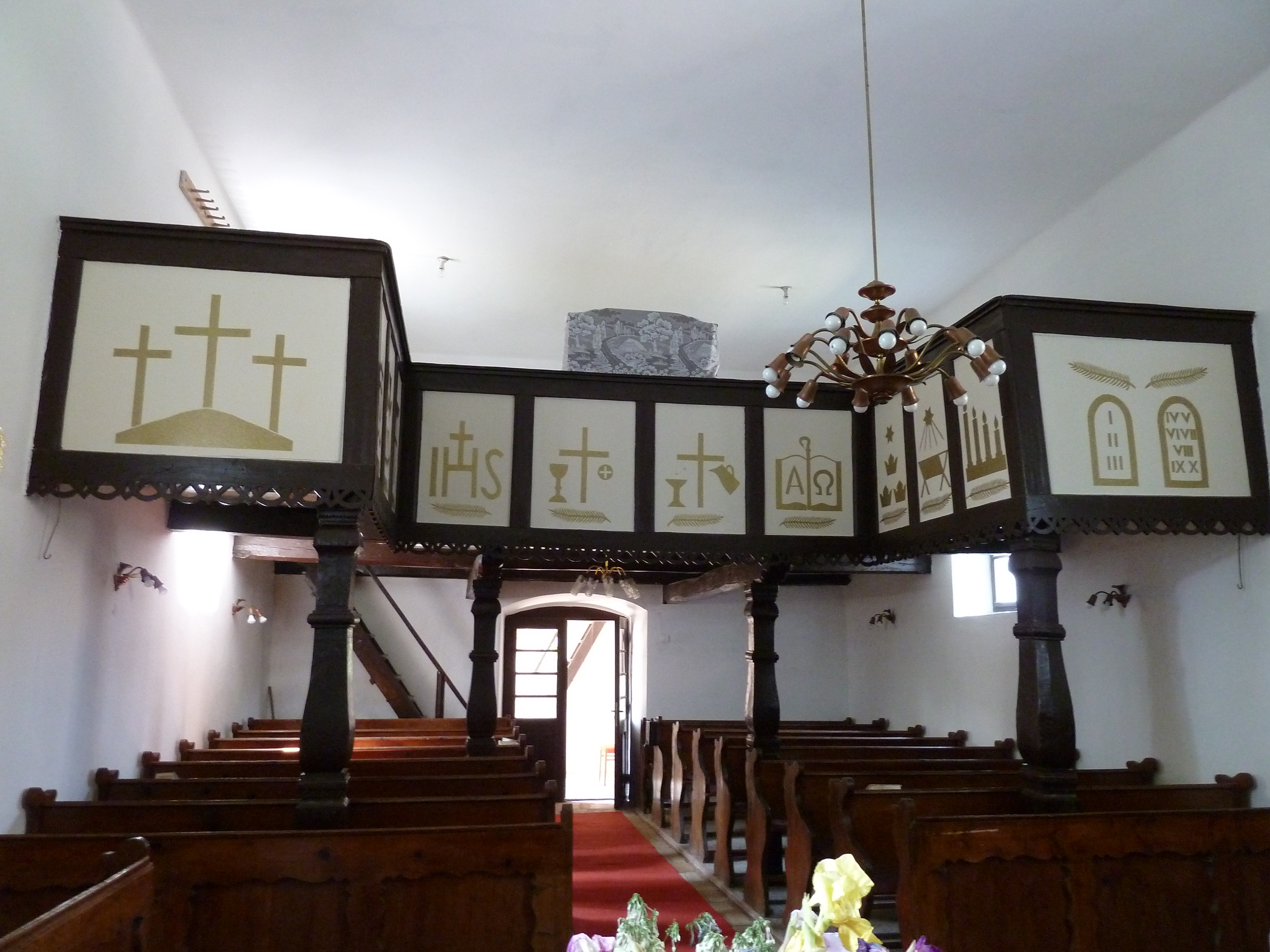 Bokor, evangélikus templom. A templom karzata. This is a photo of a monument in Hungary, Identifier: 6542